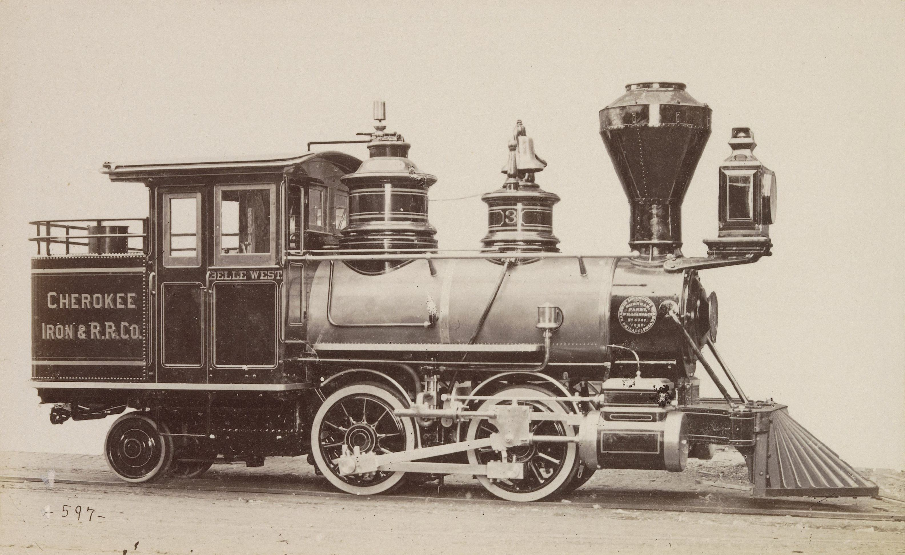 IdentificatieTitel(s): Amerikaanse stoomlocomotiefObjecttype: foto bladzijde Objectnummer: RP-F-2001-7-998-12Opschriften / Merken: nummer, recto, in negatief gekrast: ‘597’VervaardigingVervaardiger: fotograaf: anoniemPlaats vervaardiging: Verenigde Staten van AmerikaDatering: ca. 1871 - in of voor 1881Materiaal: fotopapier Techniek: albuminedrukAfmetingen: foto: h 125 mm × b 200 mmToelichtingFoto op pagina 128.OnderwerpWat: steam locomotiveVerwerving en rechtenCredit line: Aankoop met steun van de Mondriaan Stichting, het Prins Bernhard Cultuurfonds, het VSBfonds, het Paul Huf Fonds/Rijksmuseum Fonds en het Egbert KunstfondsVerwerving: aankoop 2001Copyright: Publiek domein